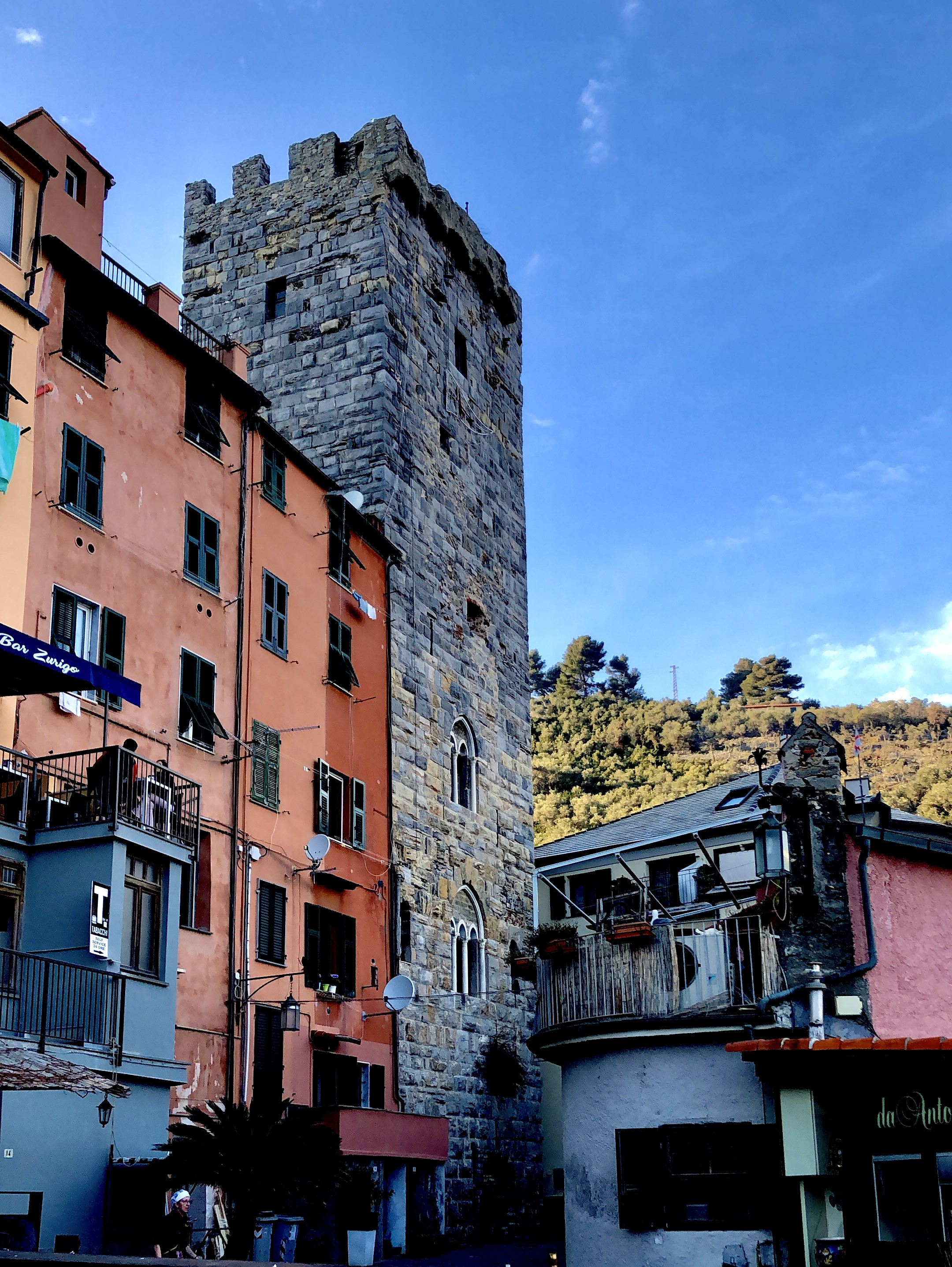 Porto Venere: Torre Capitolare nel 2019